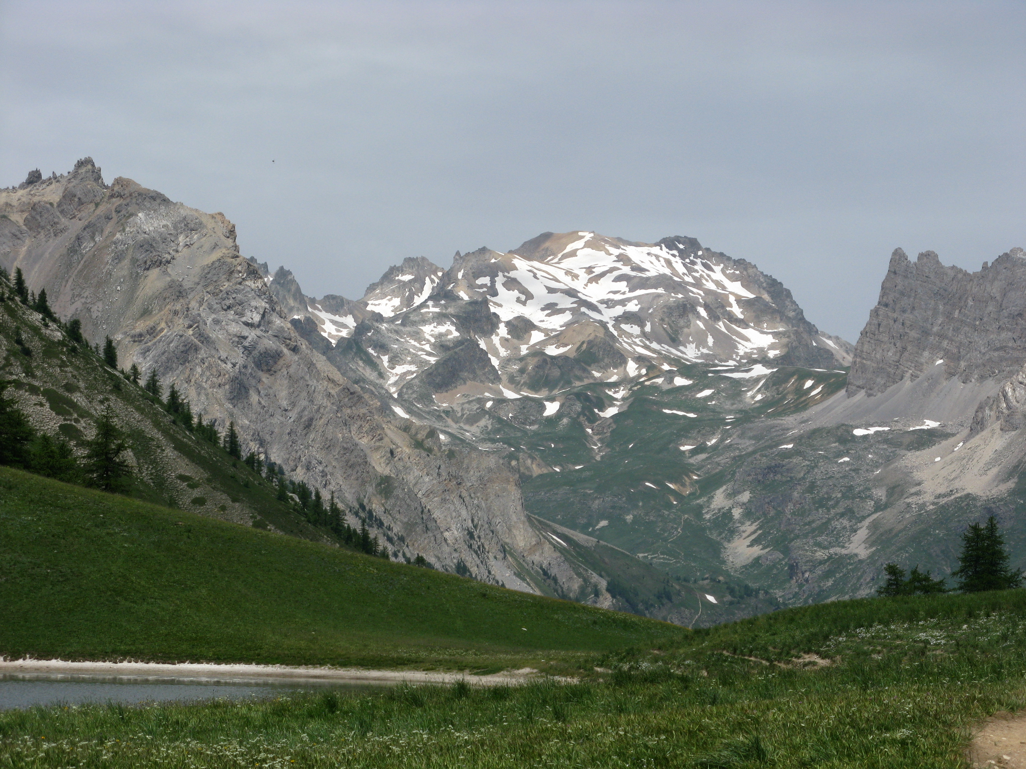 Mont Thabor (face sud-sud-ouest), vu du lac des Thures